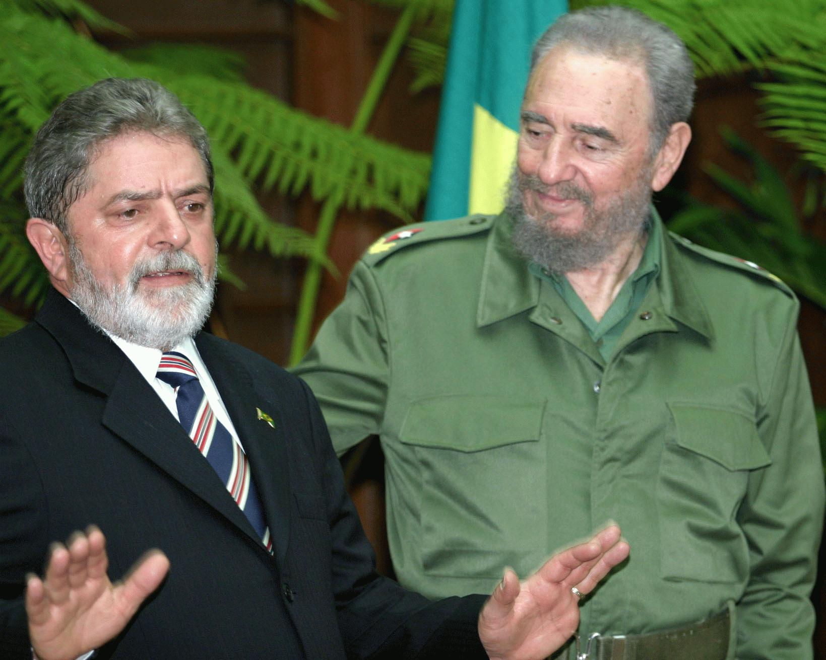 O líder cubano Fidel Castro conversa com presidentente Luiz Inácio Lula da Silva, no Palácio da Revolução.